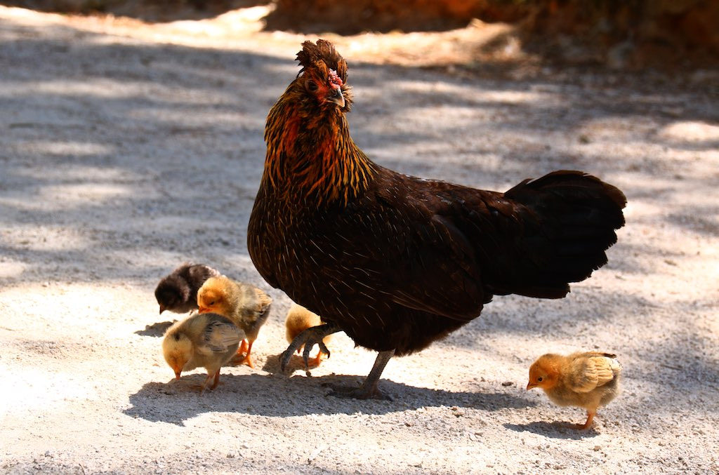 Costa do Estoril Cascais, station balnéaire sur la costa do Estoril à 25 km de Lisbonne